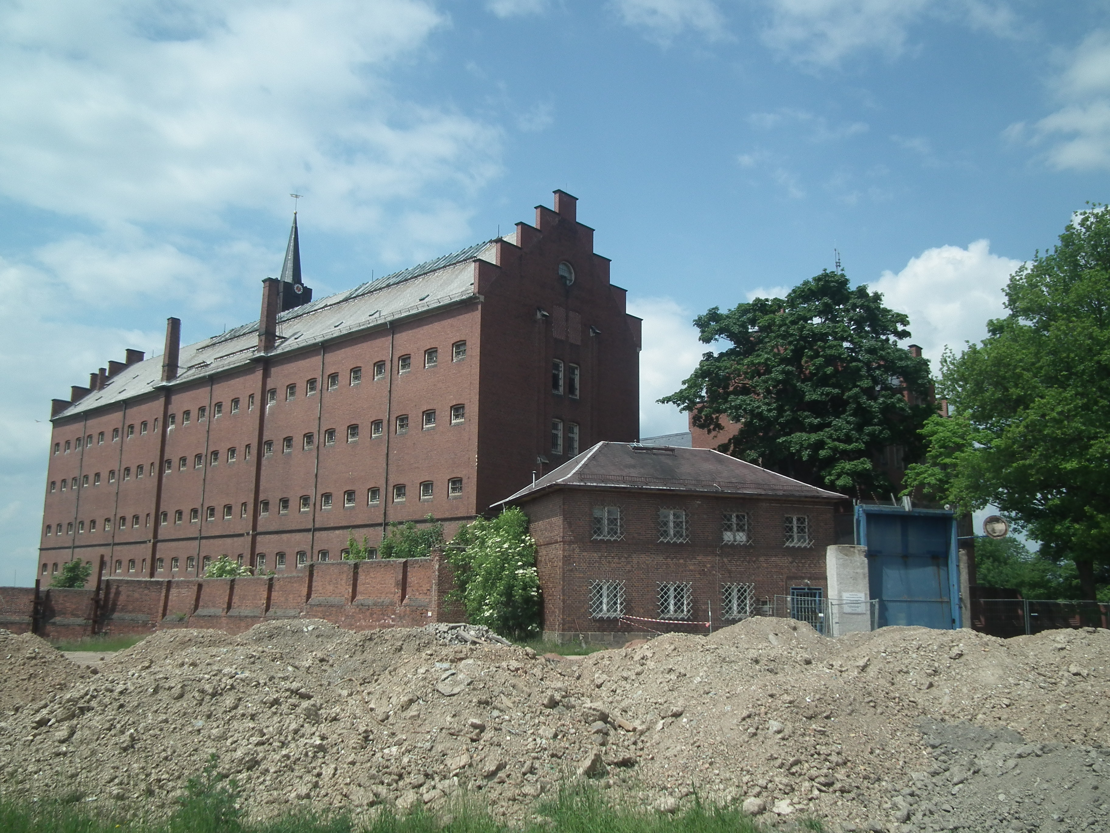 Frauengefängnis Hoheneck in Stollberg/Erzgeb. in Sachsen